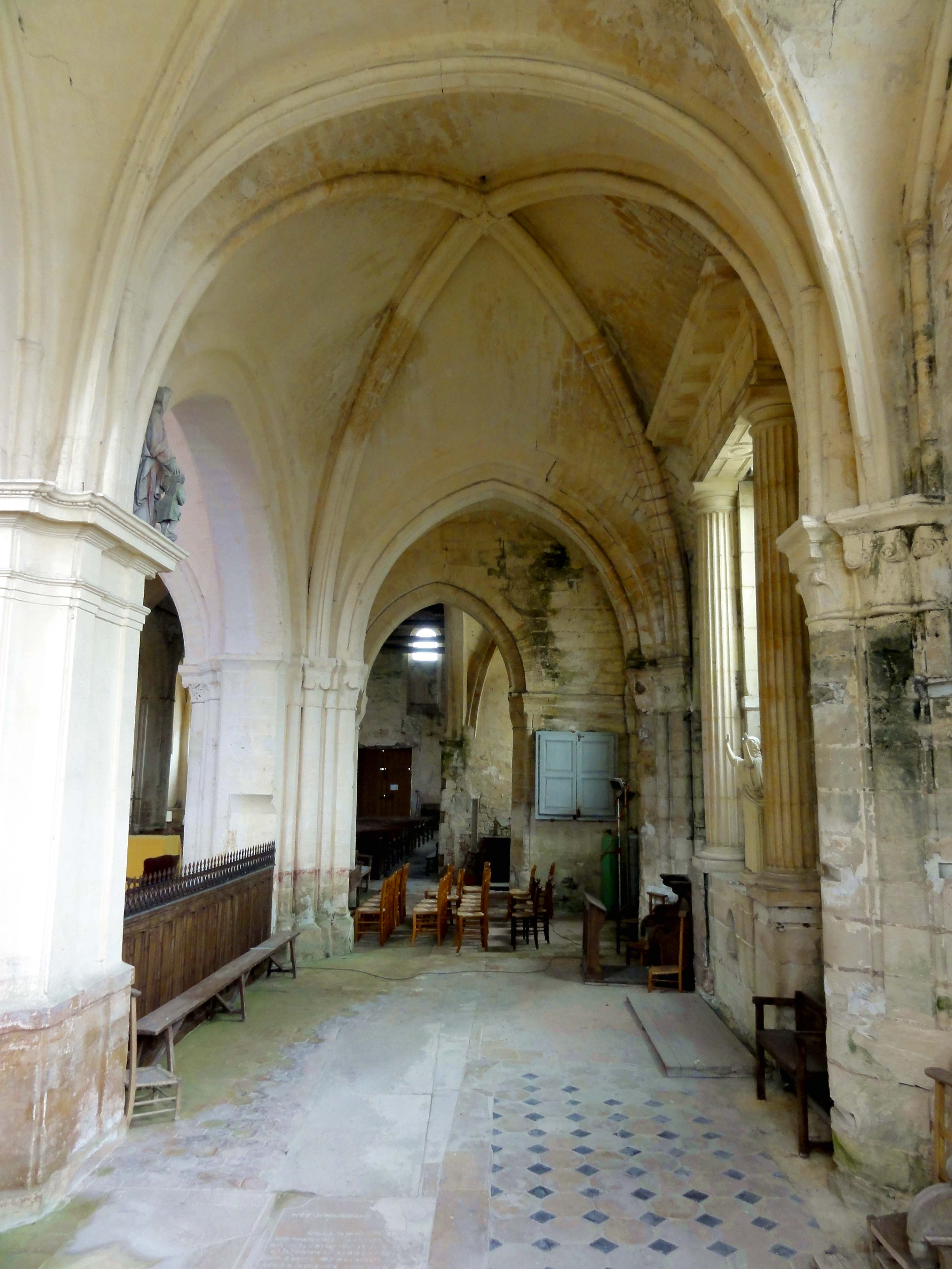 Intérieur de l'église (voir titre).